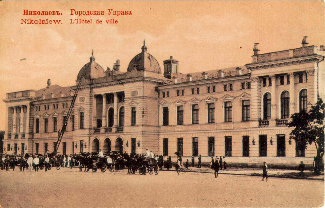 « Nikolaïew. L’Hotel de ville »